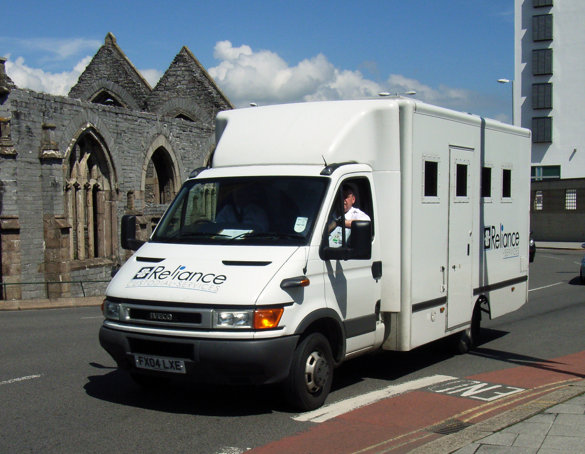 FX04LXE IVECO BOX VAN 2800cc (16/08/2004) DIESEL